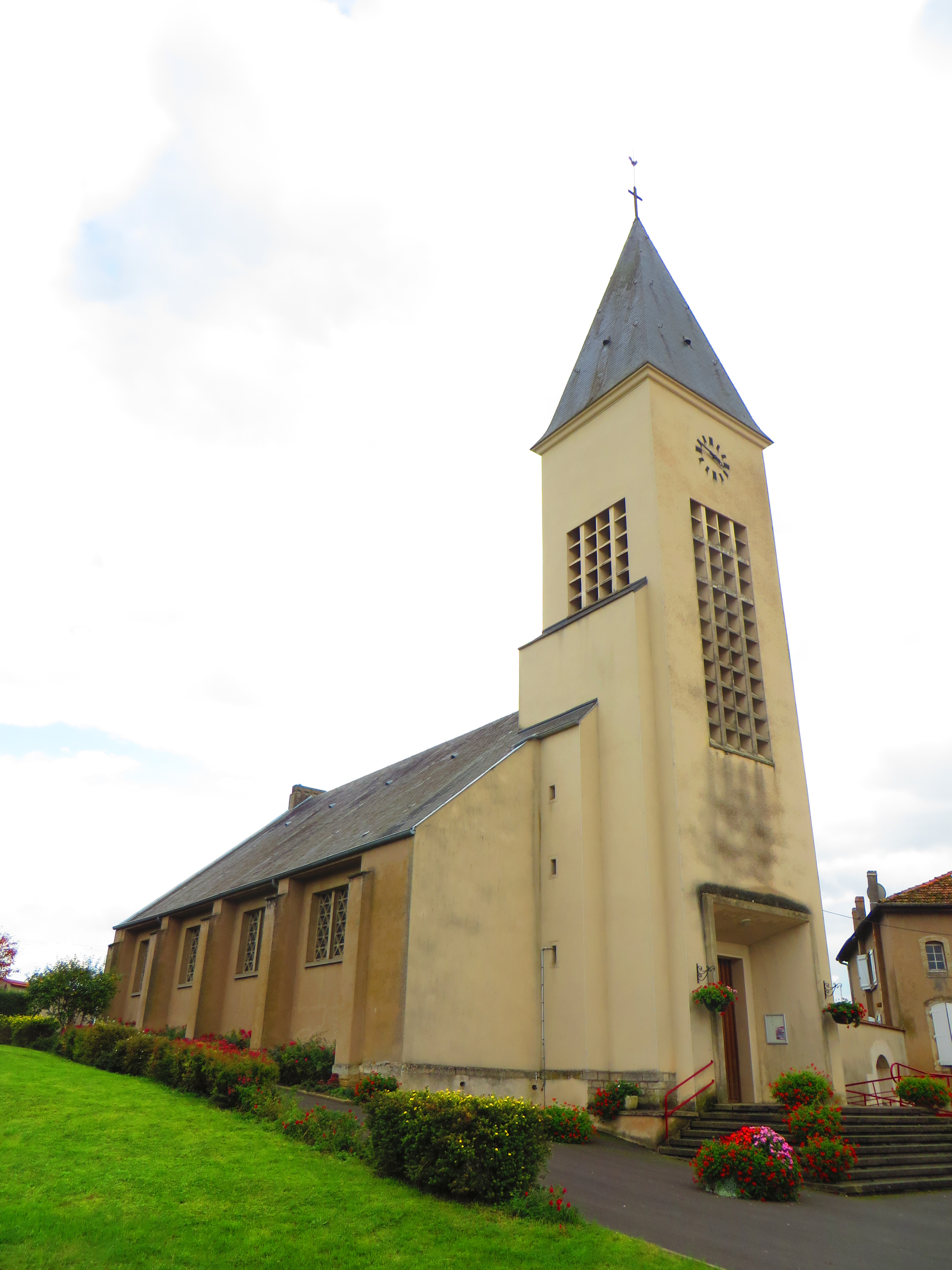 Fresnes-en-Saulnois Église Saint-Denis